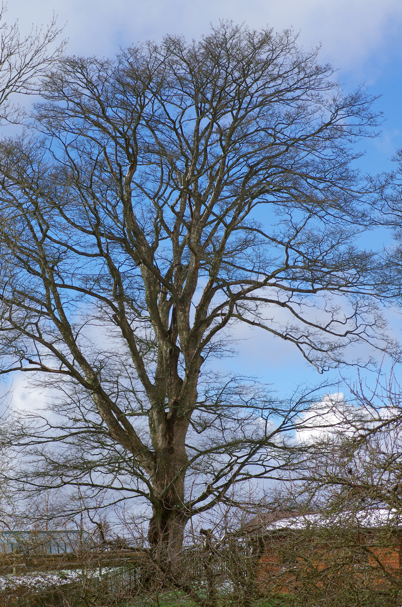 památné stromy Kleny v Kostelní Bříze, okres Sokolov